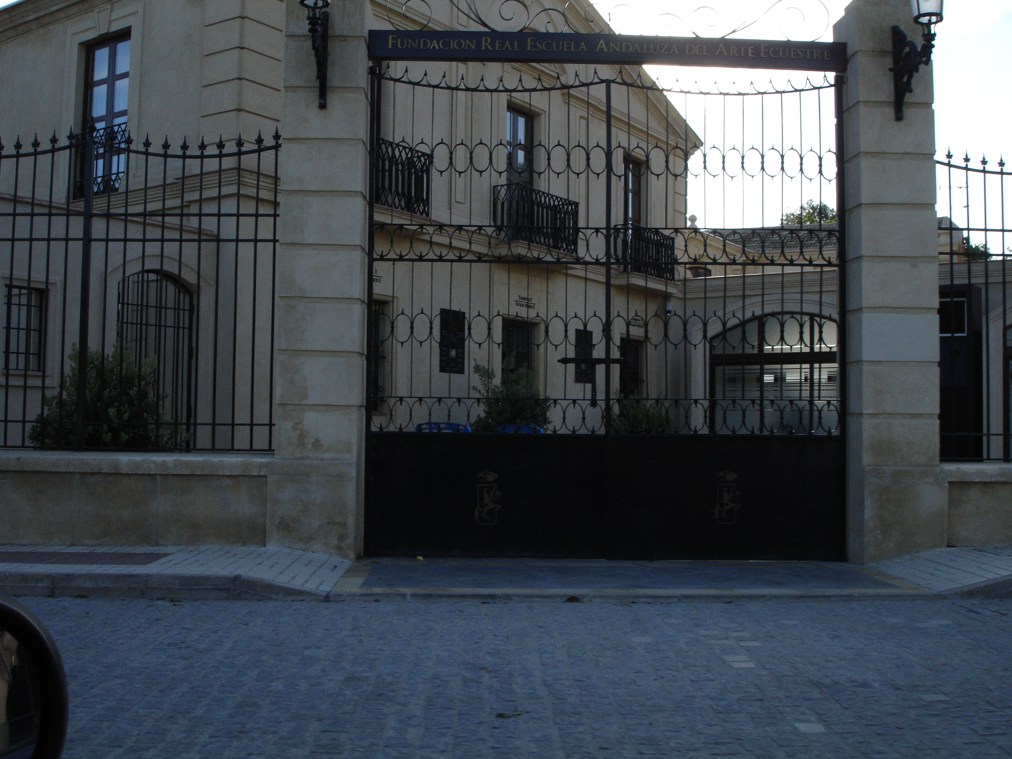 Palacio Duque de Abrantes, Jerez (Spain)